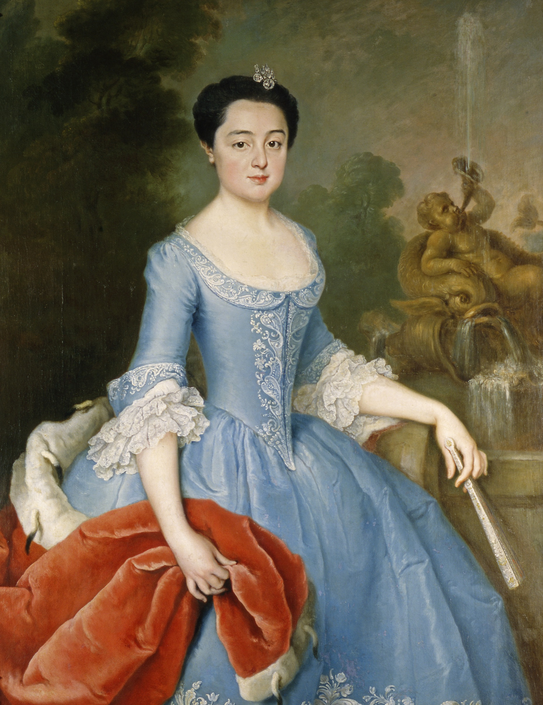 Depicted person: Henriette Amalie Prinzessin von Anhalt-Dessau